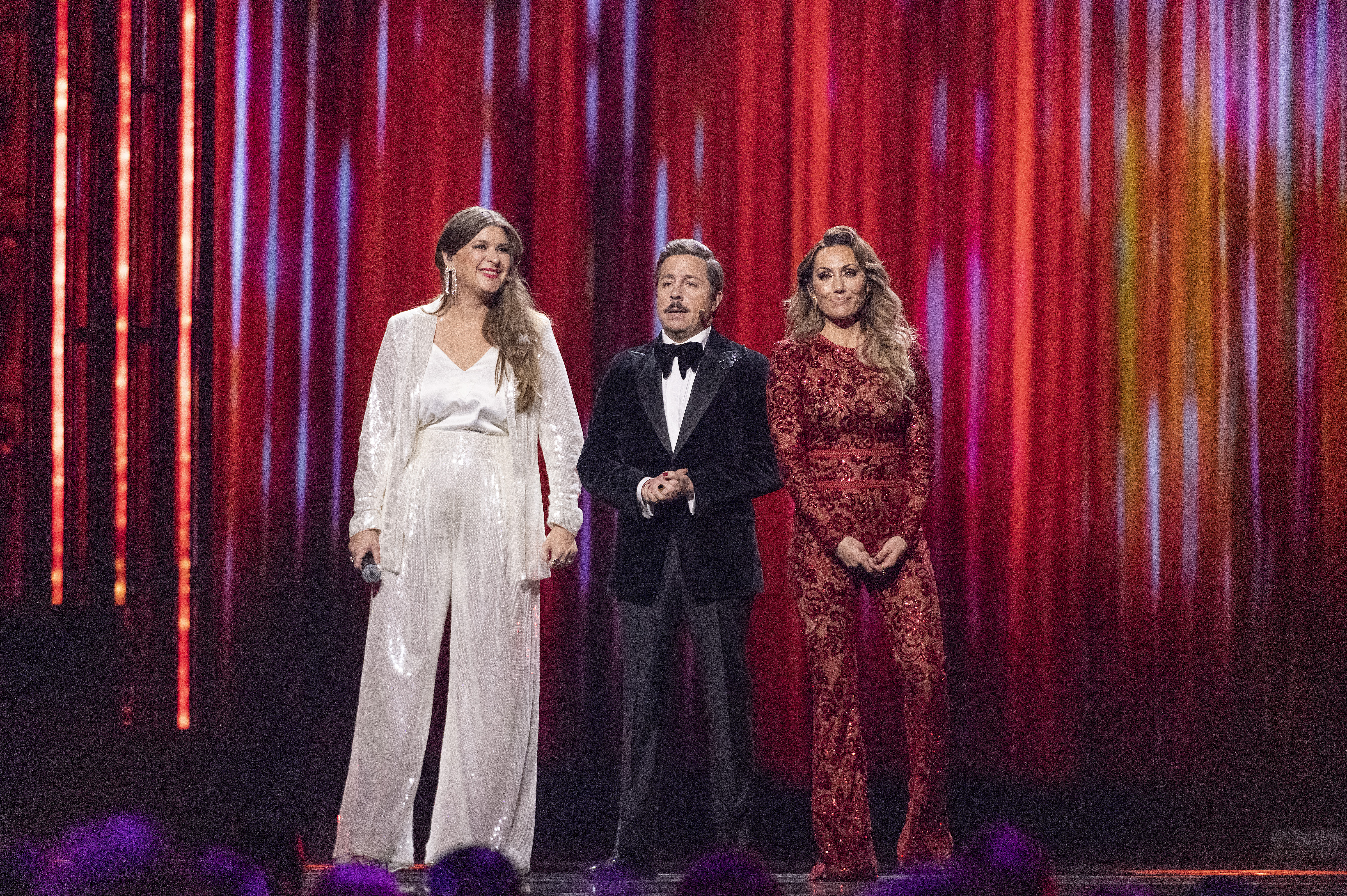 Programledarna Melodifestivalen 2020 Linköping genrep